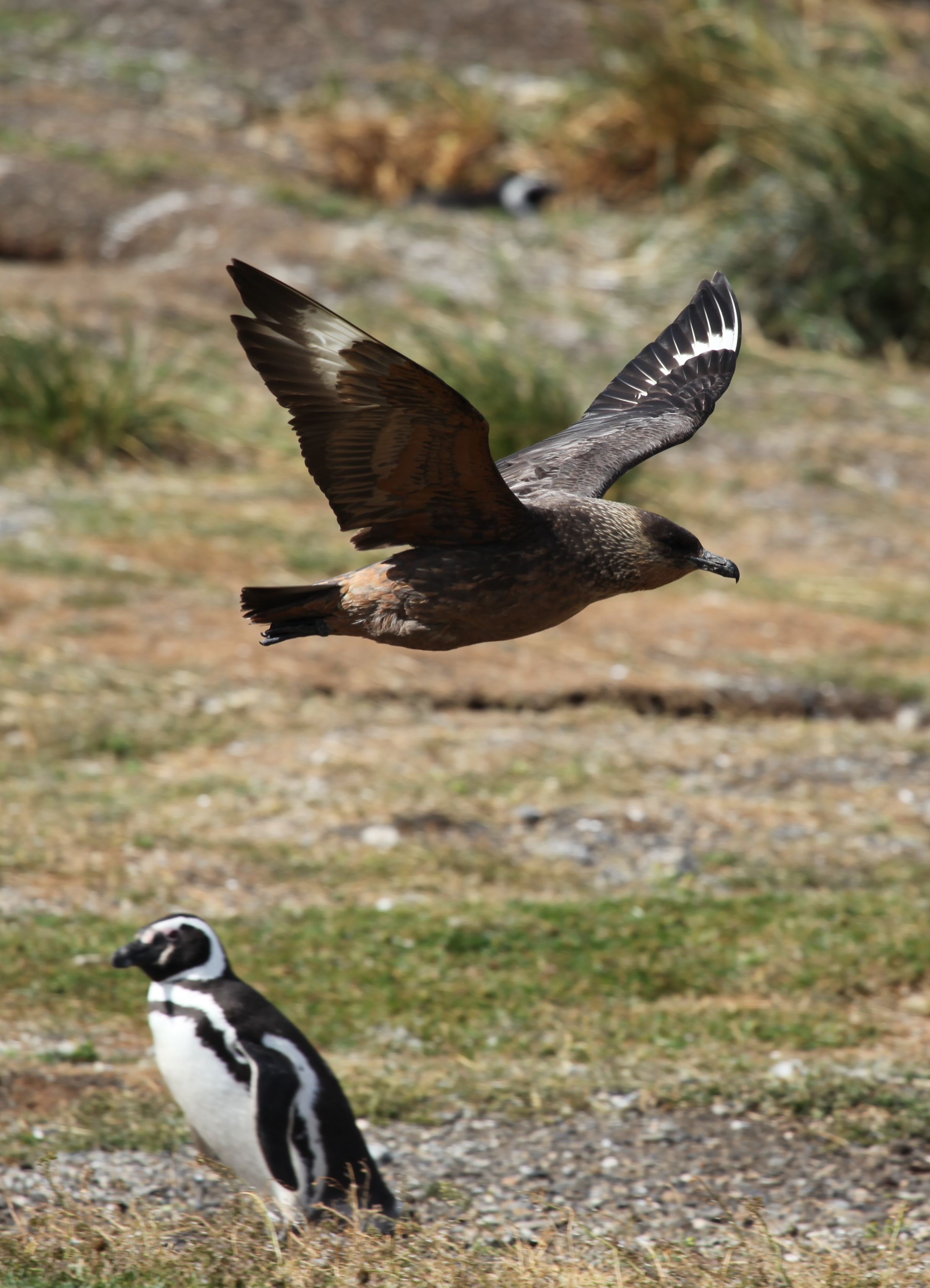 At Isla Martillo in Tierra del Fuego, Argentina.